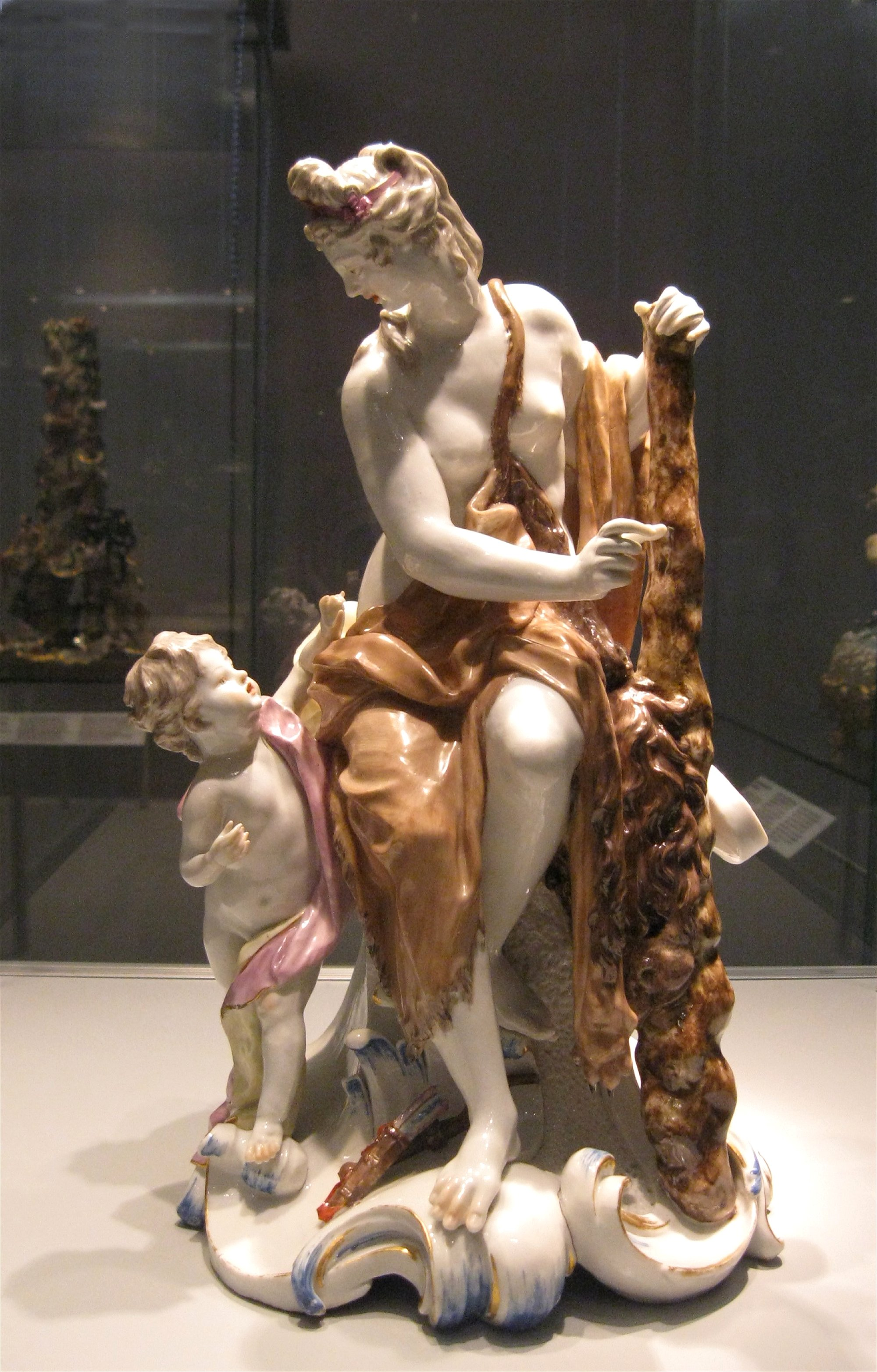 (Modell von) Dominik Auliczek: Omphale, um 1770, Porzellanmanufaktur Nymphenburg, im Bayerischen Nationalmuseum